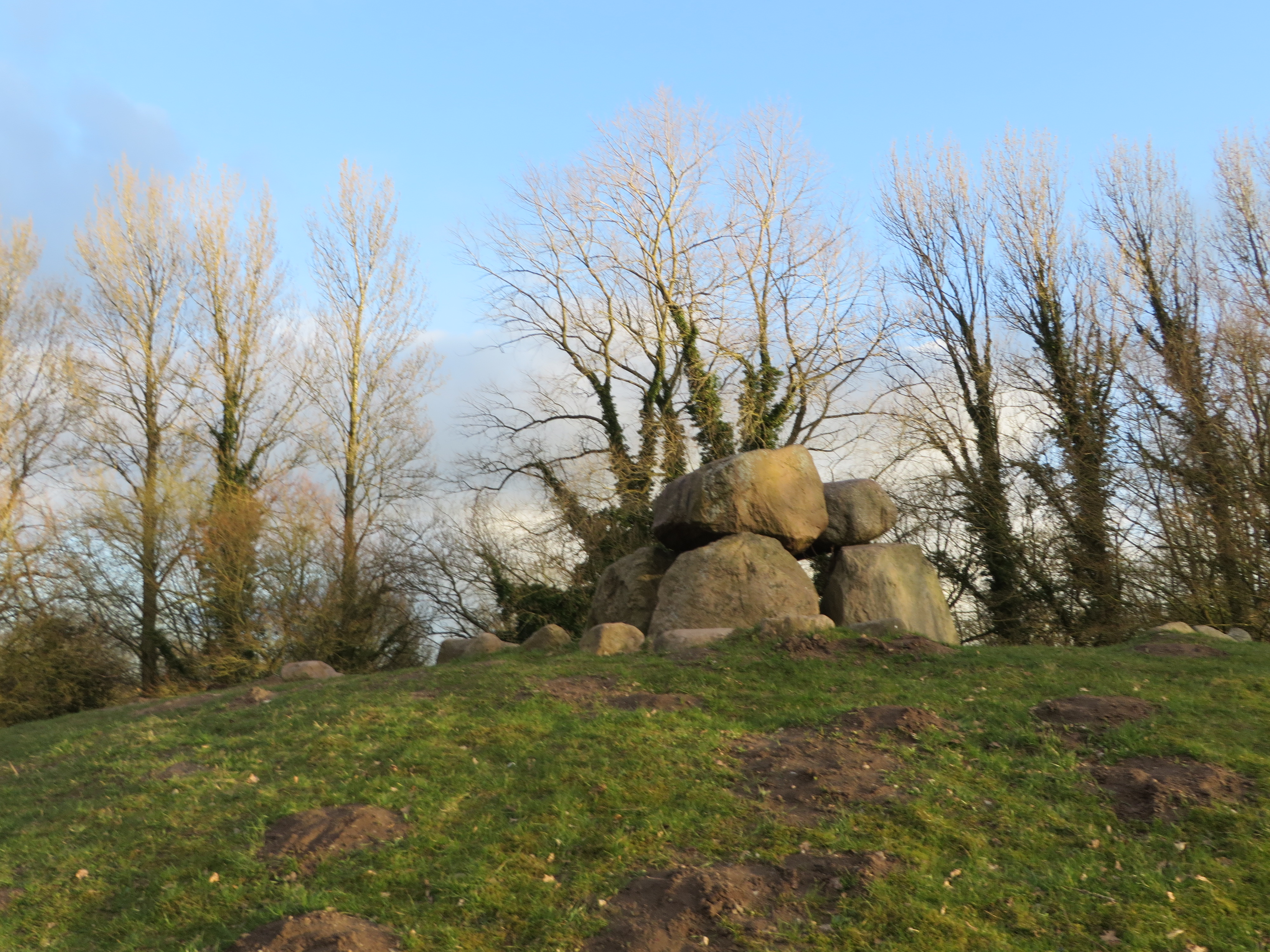 Nachgebautes Hünengrab, KGS Adelby, Bild 03